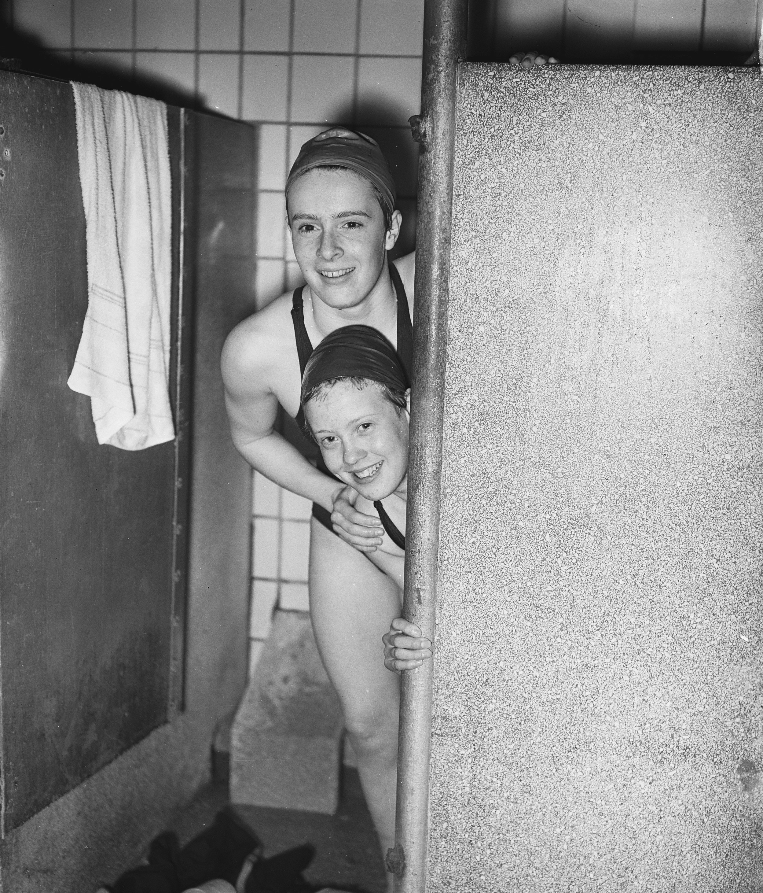 Collectie / Archief : Fotocollectie Anefo Reportage / Serie : [ onbekend ] Beschrijving : Zwemwedstrijden Marij Kok en Aty Voorbij Datum : 2 april 1955 Locatie : Amsterdam, Noord-Holland Trefwoorden : ZWEMWEDSTRIJDEN Persoonsnaam : Aty Voorbij, Kok, Mary Fotograaf : Bilsen, Joop van / Anefo Auteursrechthebbende : Nationaal Archief Materiaalsoort : Glasnegatief Nummer archiefinventaris : bekijk toegang 2.24.01.09 Bestanddeelnummer : 907-0518